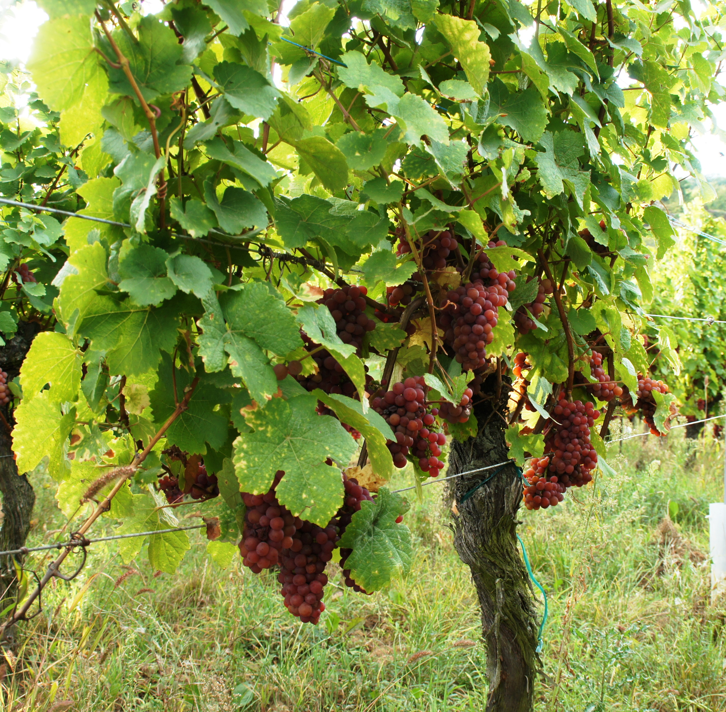 Grappe de guewurstraminer grand cru Goldert